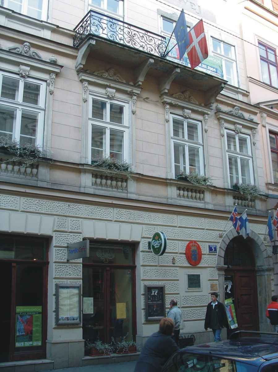 Nordic Hause w Krakowie 23-10-2004r